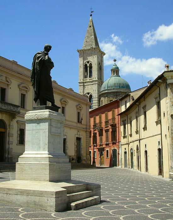 Sulmona